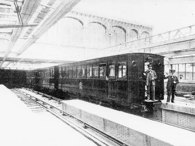 Paris - Bastille - juillet 1900